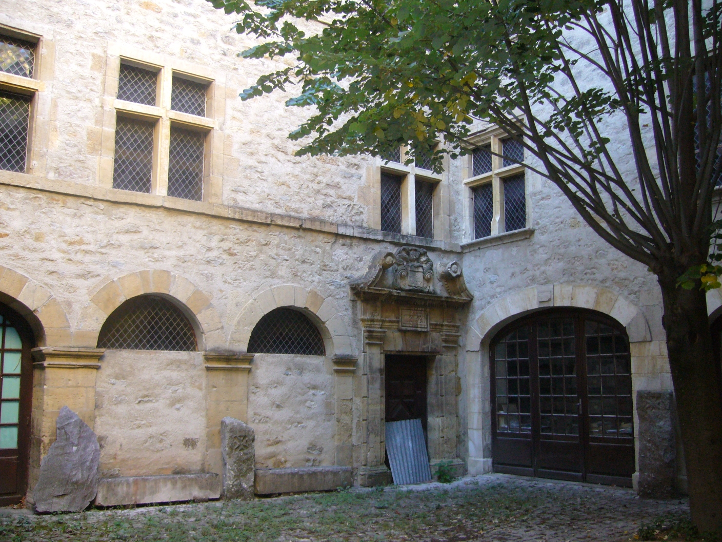 Hôtel de Ressouches, ancienne usine électrique puis musée Ignon-Fabre de Mende (Lozère, France)